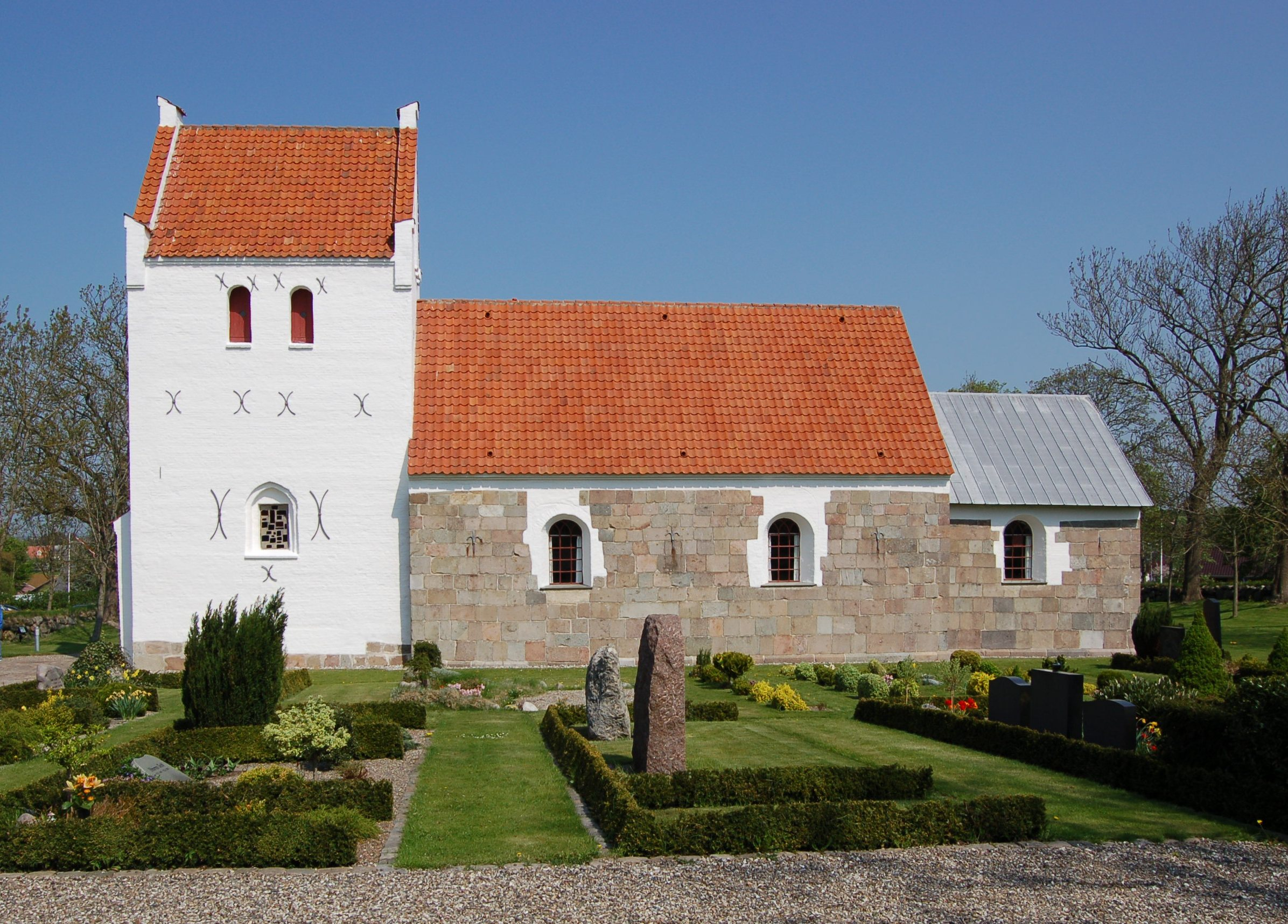 Klarup Kirke er en kirke i Aalborg Østre Provsti (Aalborg Stift) og Aalborg Kommune